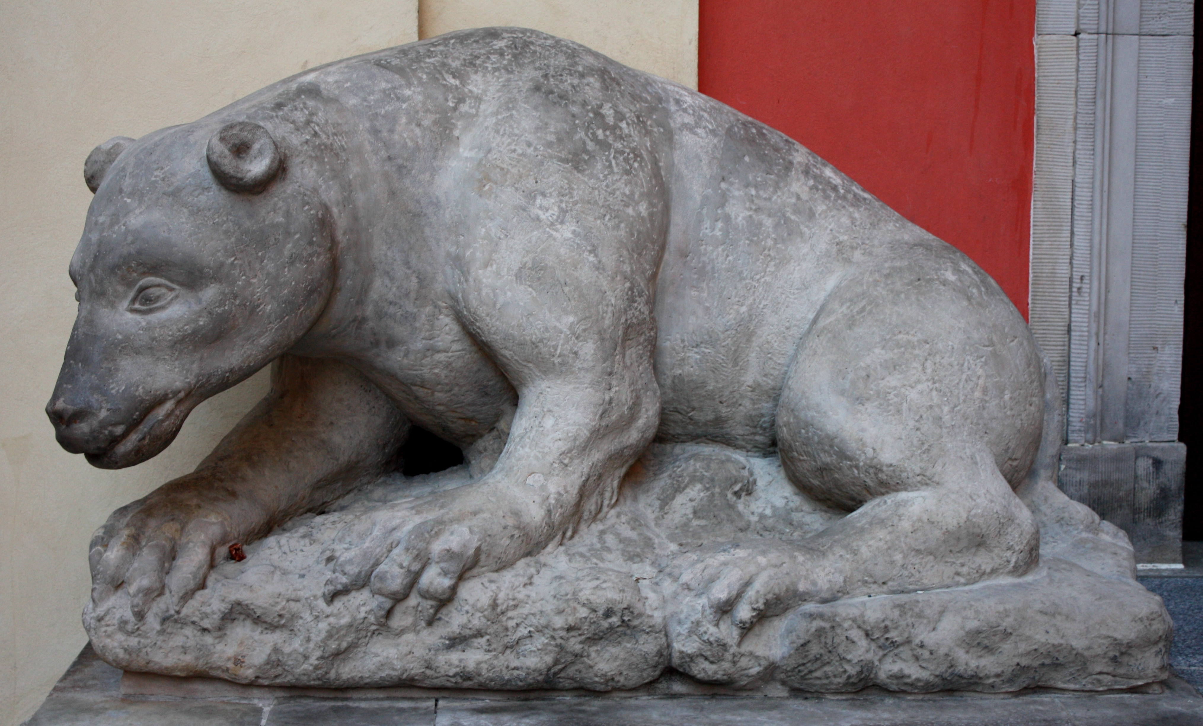 Rzeźba niedźwiedzia prze wejściem do kościoła Matki Boskiej Łaskawej.